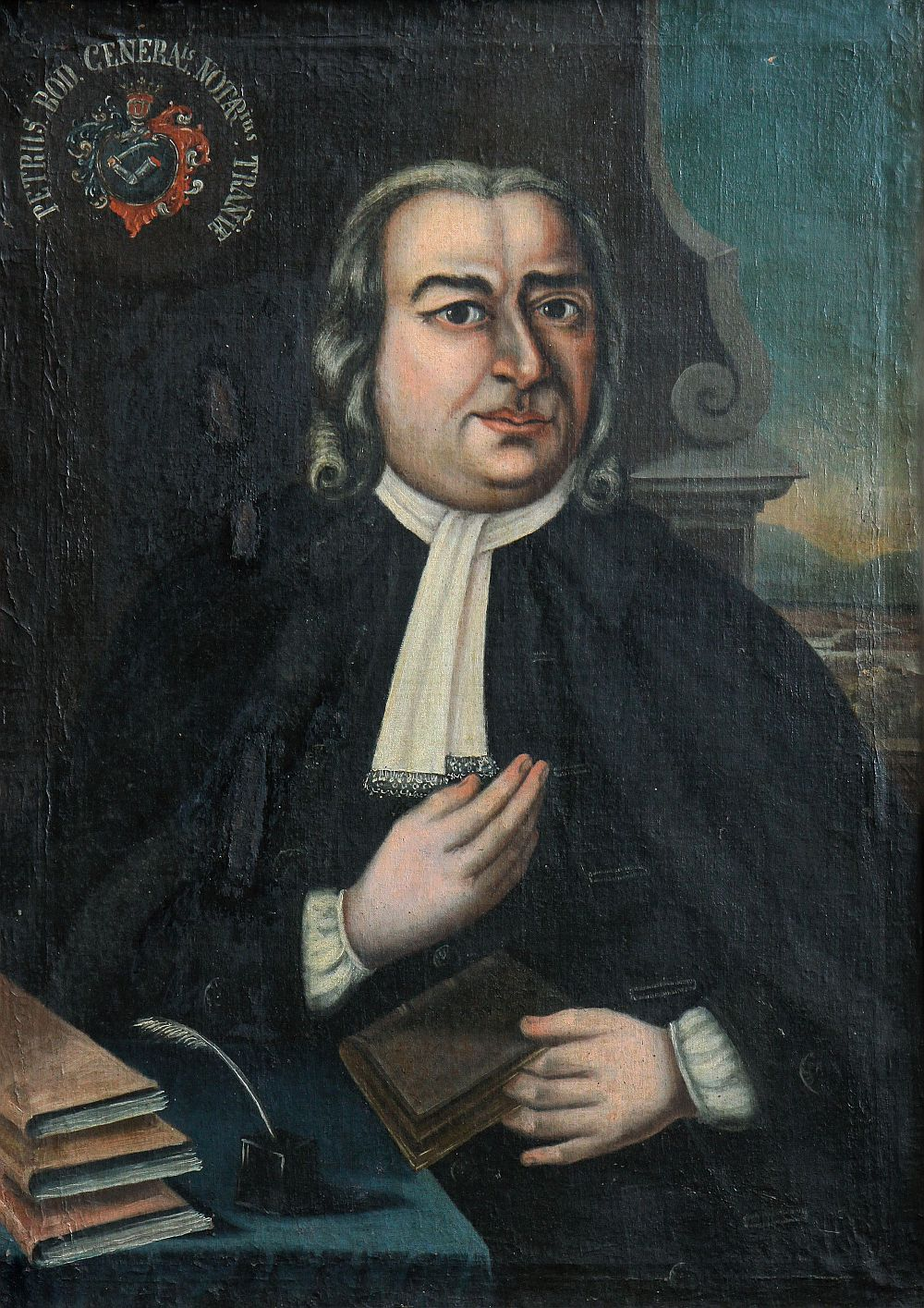 Bod Péter portréja (a kolozsvári Szépművészeti Múzeum gyűjteményéből)